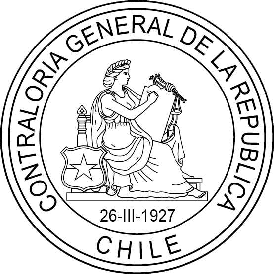 Sello de la Contraloría General de la República de Chile